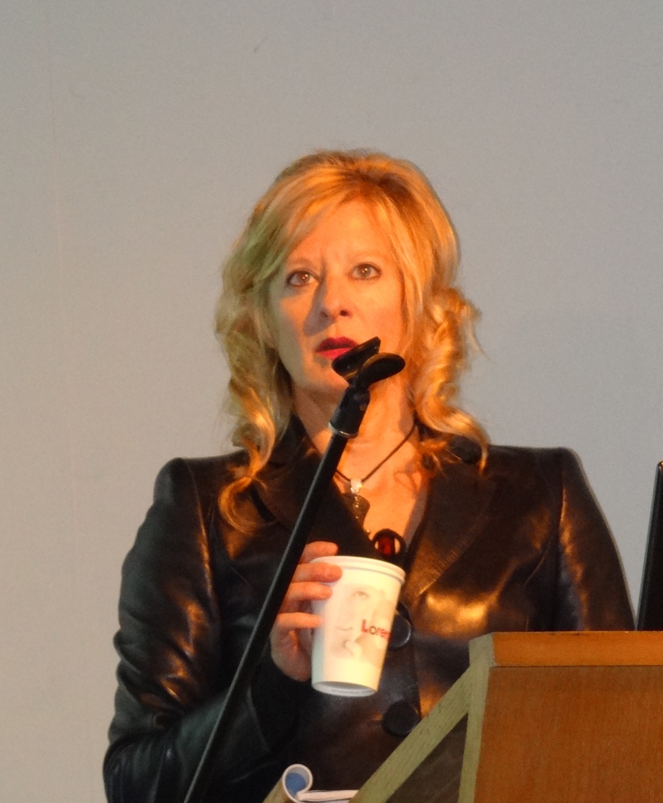 הצלמת והפסלת הבריטית אליסון ג'קסון במפגש עם הקהל במוזיאון חיפה לאמנות שבו הציגה וספרה על עבודתה